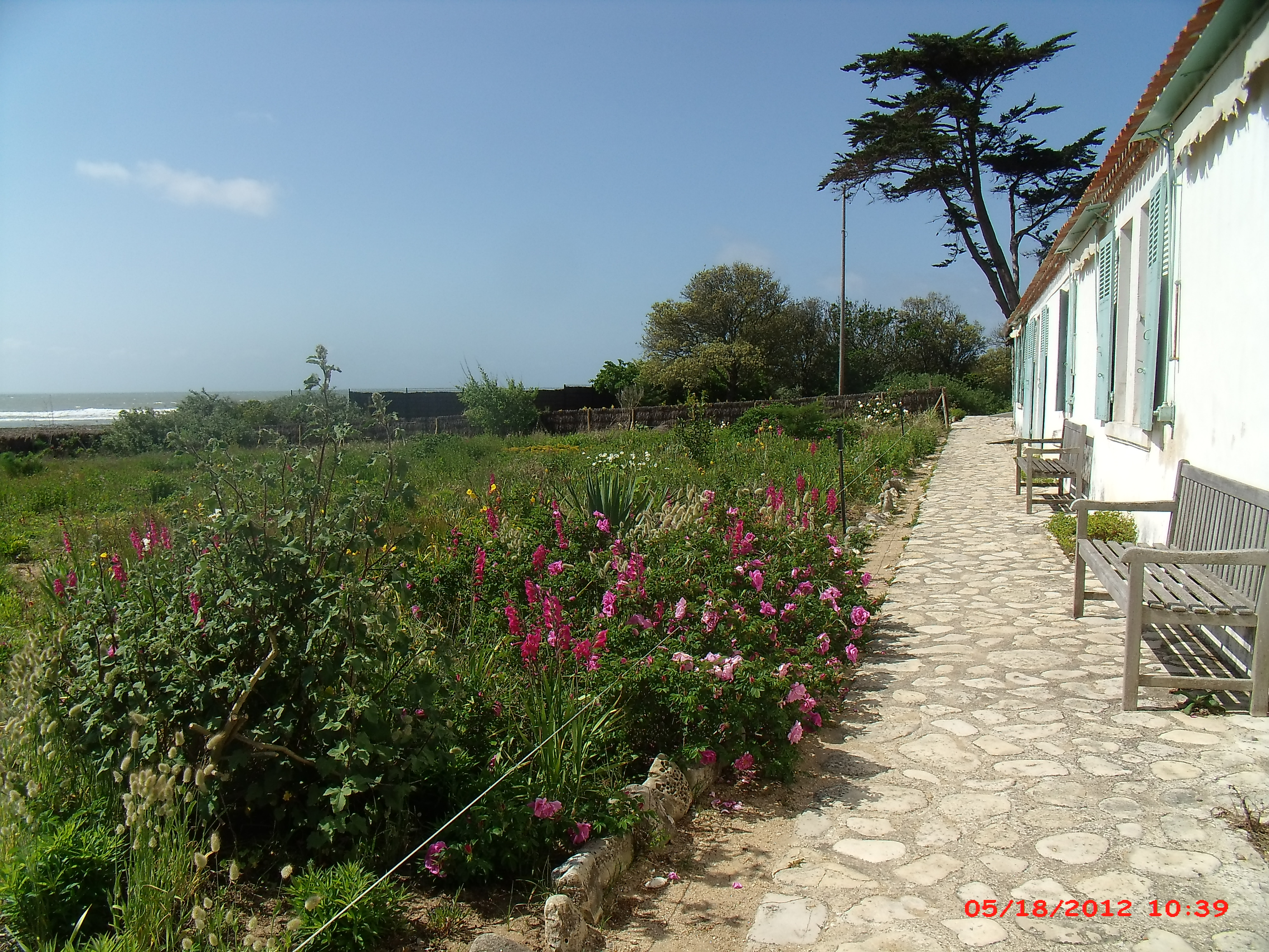 Maison de Georges Clémenceau, Saint-Vincent-sur-Jard (Vendée).La terrasse donnant sur le jardin aux 7 000 fleurs (plein sud).